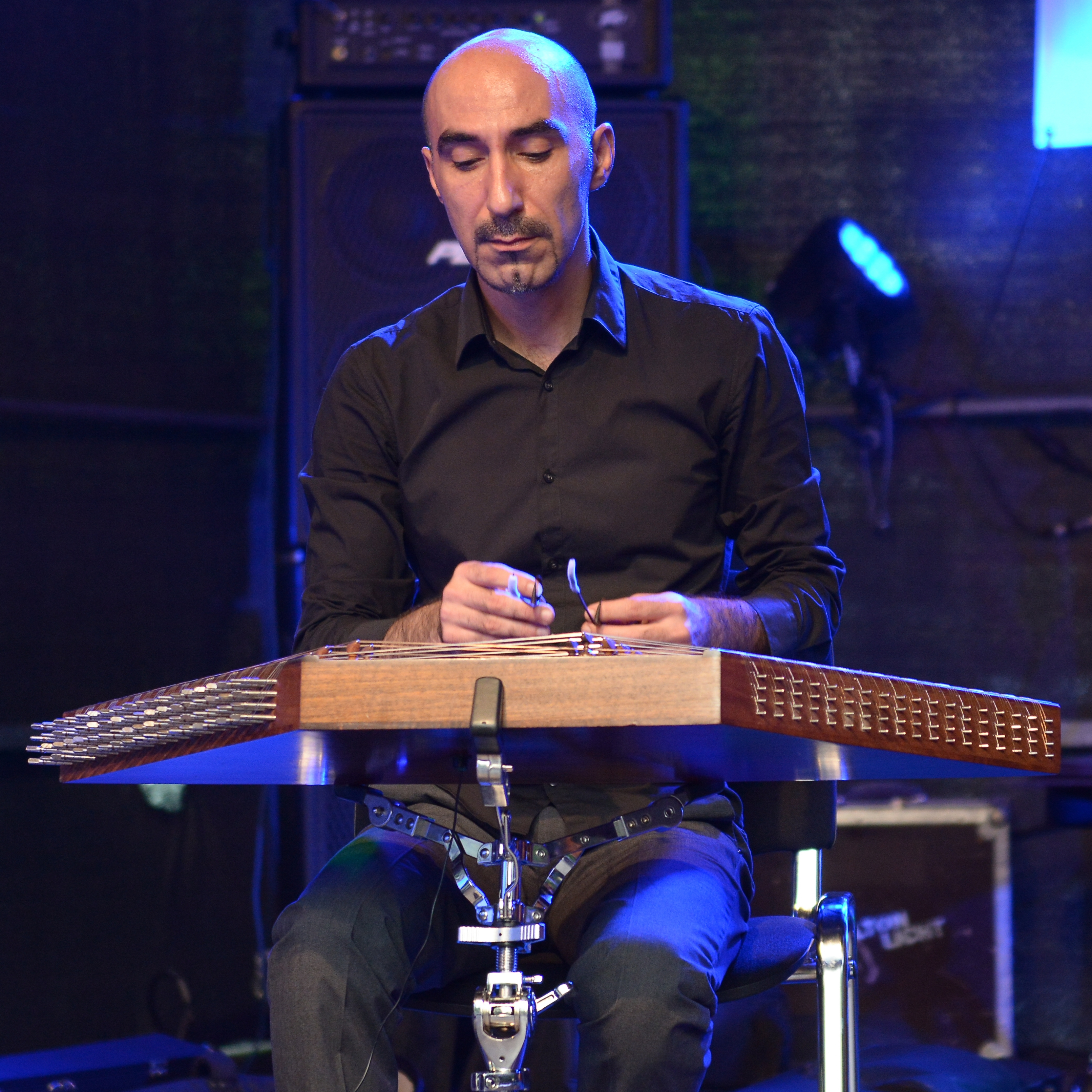 Kioomars Musayyebi Quartett bei Essen.Original. 2015